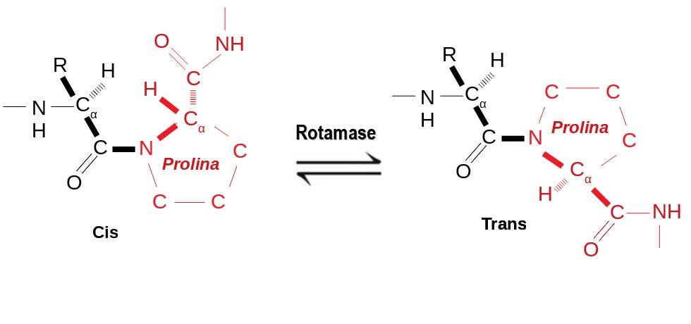 A imagem se refere a mudança de configuração feita pela enzima rotamase